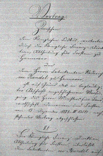 Auf 40 Jahre befristeter Vertrag über den Abbau von Torf im Gebiet des Toten Moores zwischen dem Steinhuder Meer und Neustadt am Rübenberge. Vertragspartner: Königlicher Fiskus, vertreten durch die Königliche Finanz-Direktion, Abteilung für Forsten zu Hannover, sowie der in Hannover ansässige Fabrikant Roderich von Bandel ...